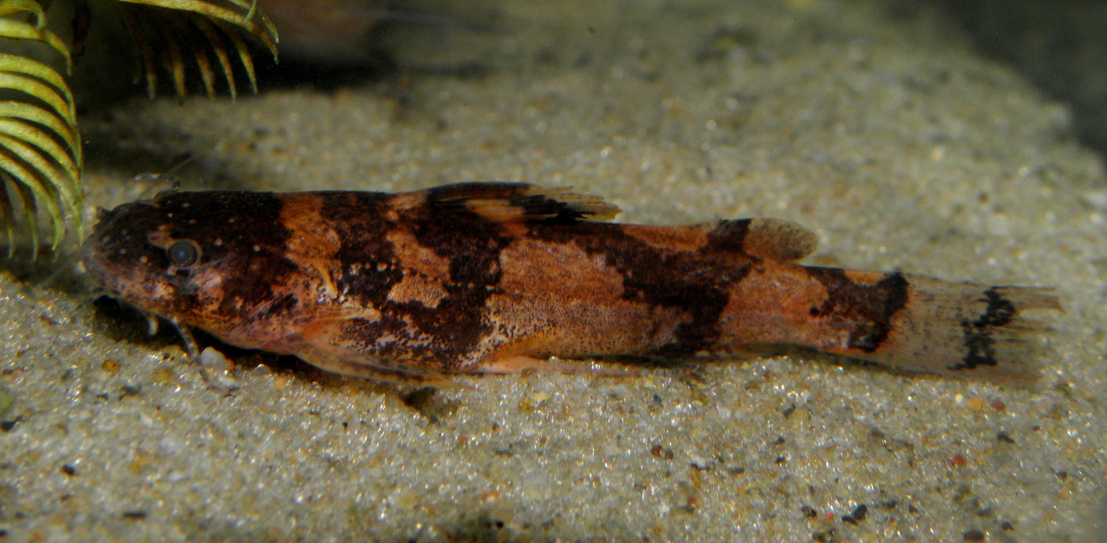 Un ejemplar perteneciente al género Microglanis, integrado por pequeños peces silúridos de agua dulce de la familia Pseudopimelodidae.